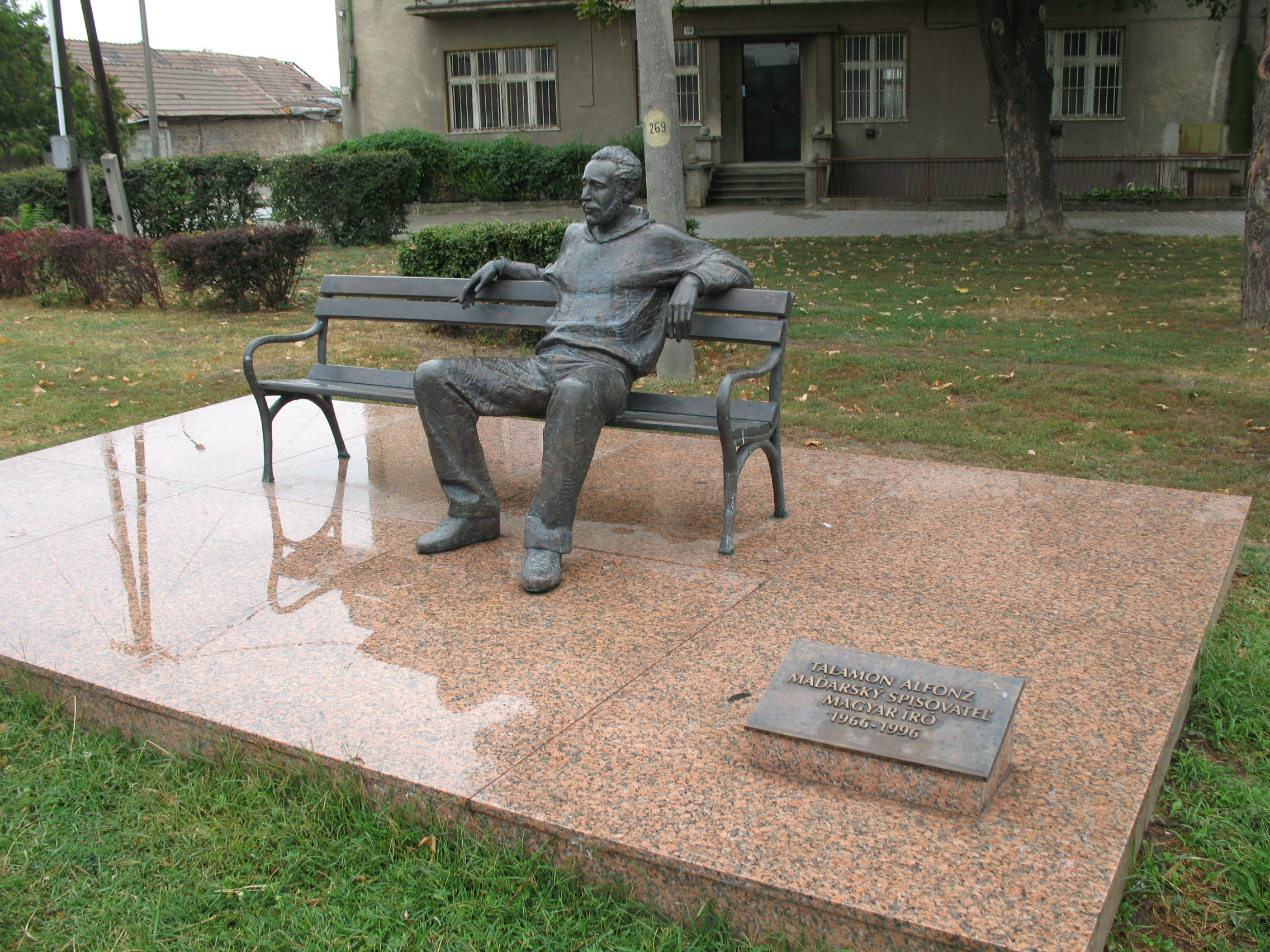 Diószeg